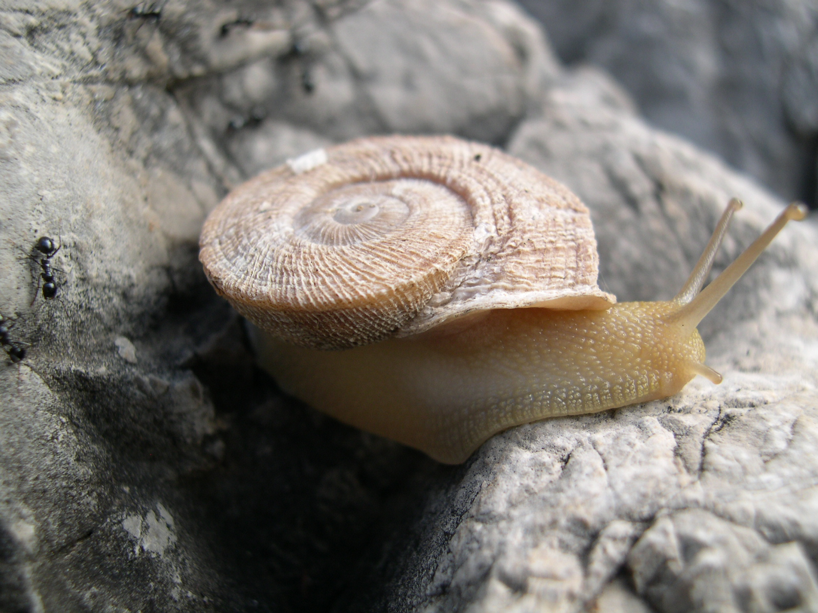 Ejemplar de Iberus gualtieranus gualtieranus desplazándose por la roca caliza en Sierra Elvira (Granada, España).